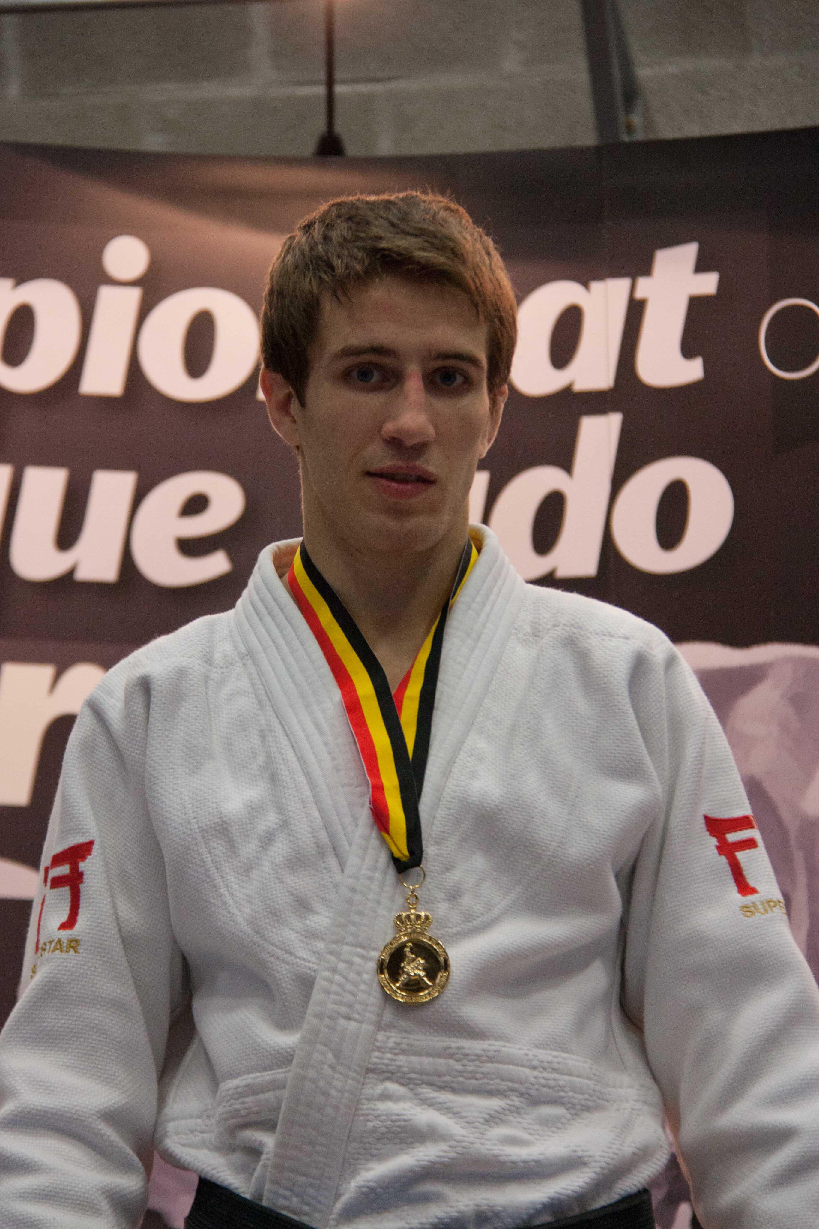 Jasper Lefevere